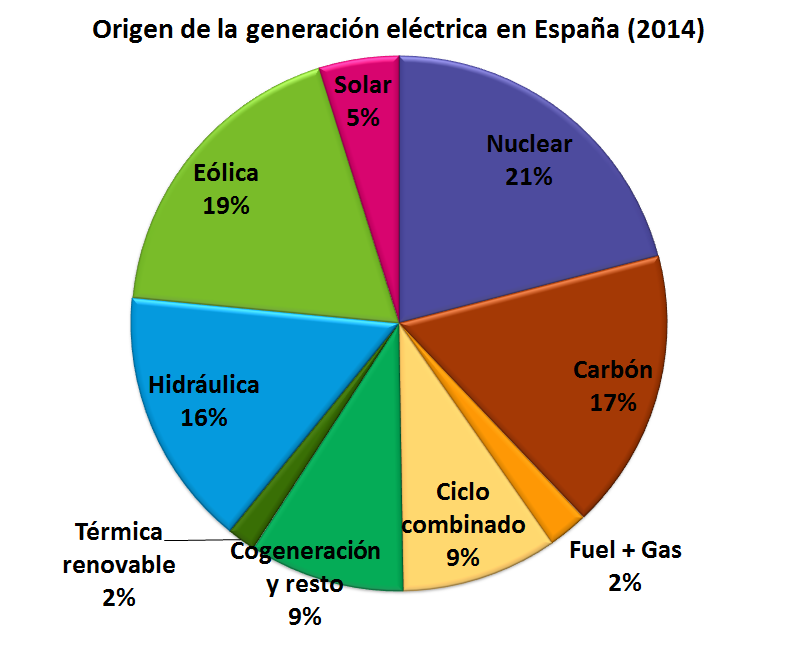 Origen de la energía eléctrica en España 2014. Datos de